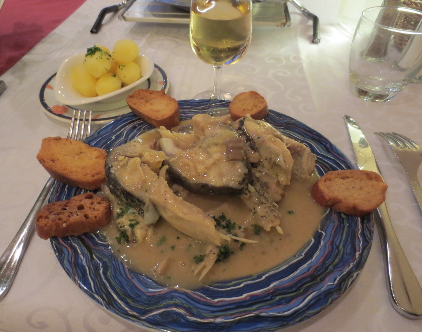 Pôchouse dans un restaurant de Saint Jean de Losne au bord de la Sâone